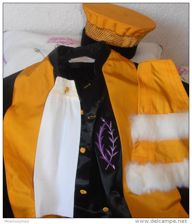 Ancienne toge avec palmes brodées